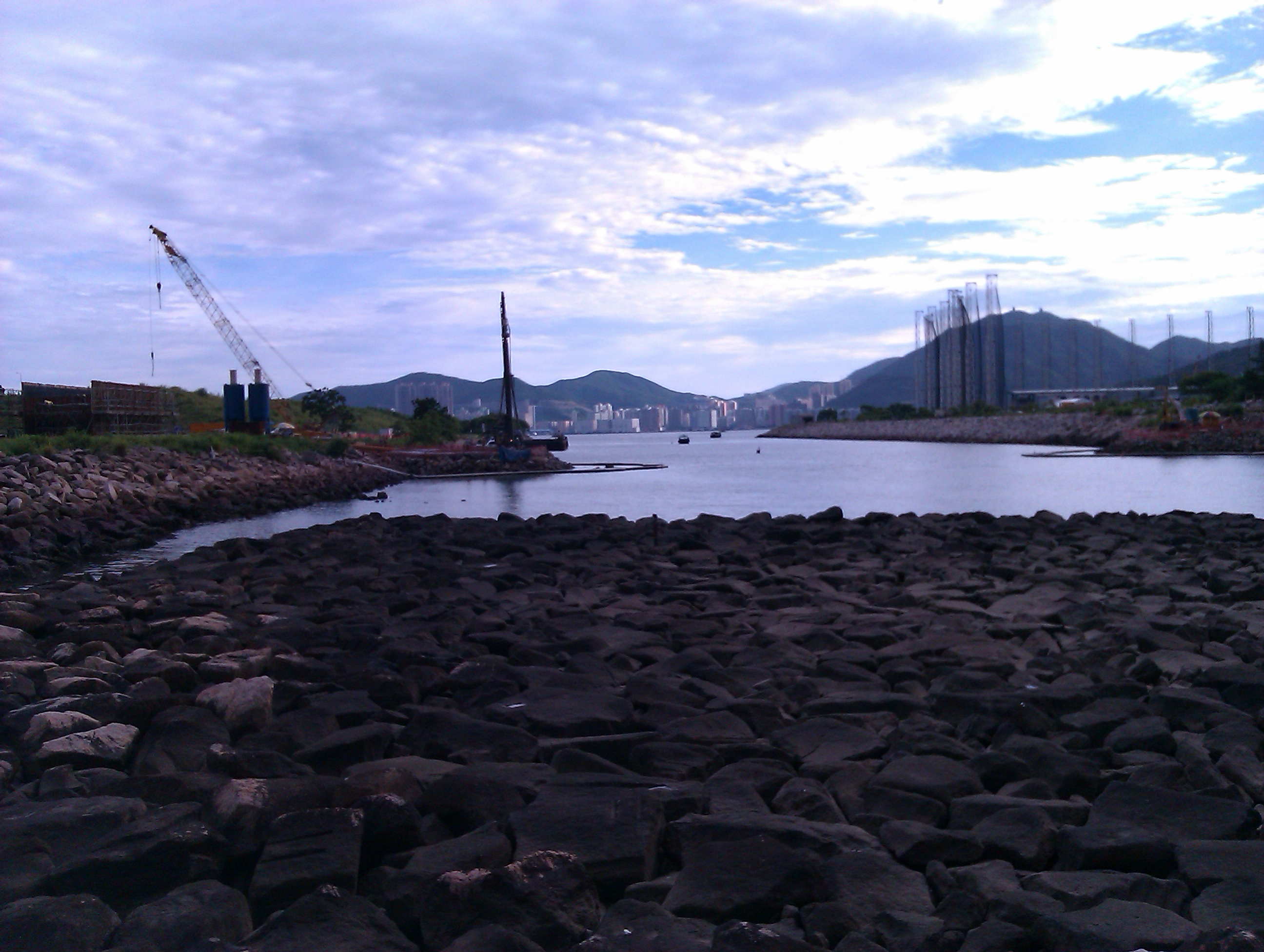 將軍澳跨灣連接路工地